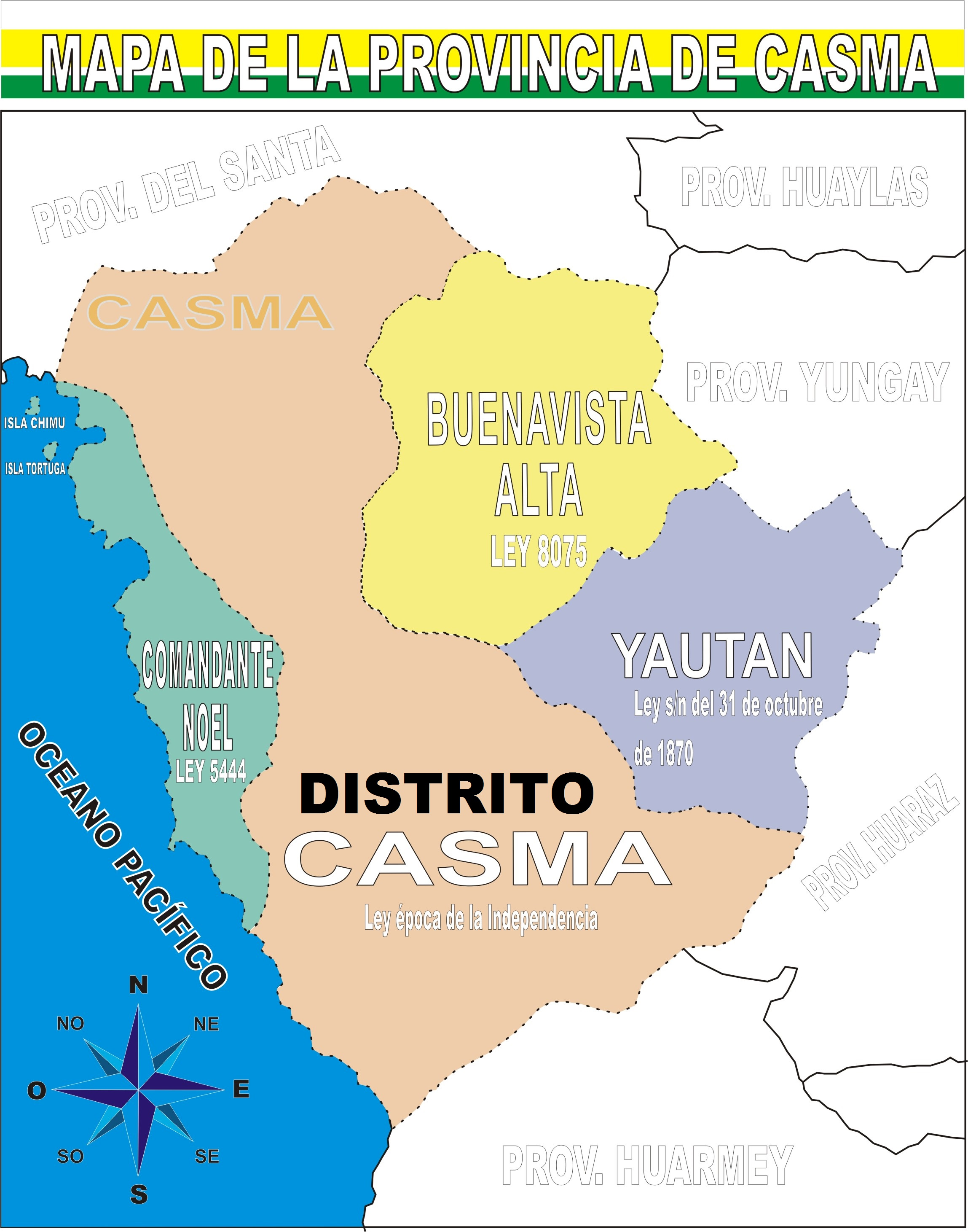 Mapa provincia de Casma con Distrito Casma